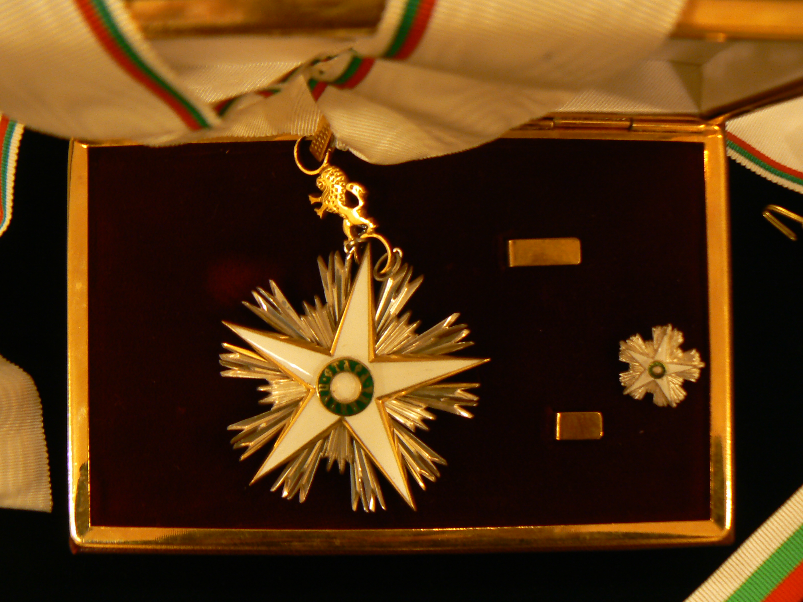 Oрден "Стара планина" на Николай Гяуров